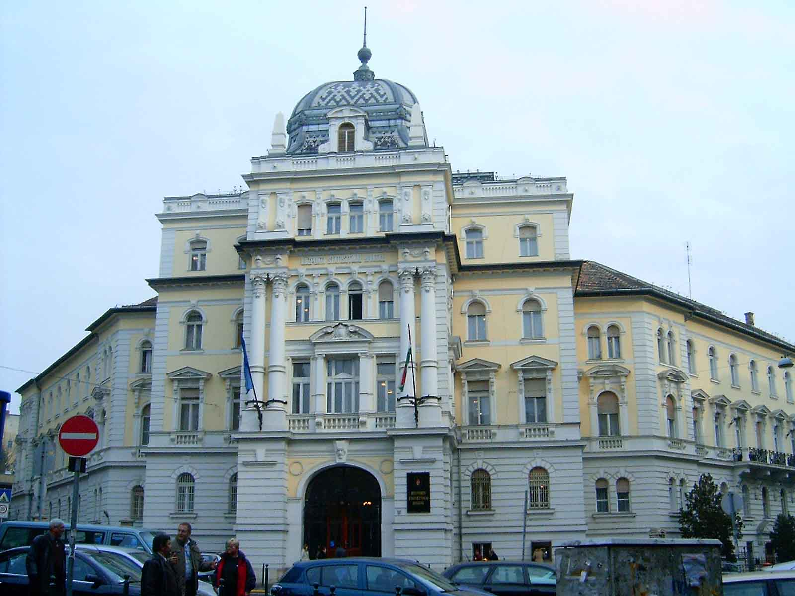 A Központi Statisztikai Hivatal főépülete, épült 1897-ben Czigler Győző tervei alapján (Budapest, II. kerület, Keleti Károly u. 5-7.)